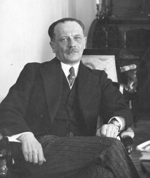 Kazimierz Świtalski, speaker of Polish Parliament (Sejm)